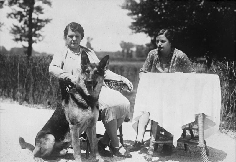 Die Herzogin von Manchester mit ihrer Tochter Lady Montague in Bad Pistyan ! Die Herzogin von Manchester (links) und ihre Tochter Lady Montague im Kurgarten von Bad Pistyan zur Erholung.